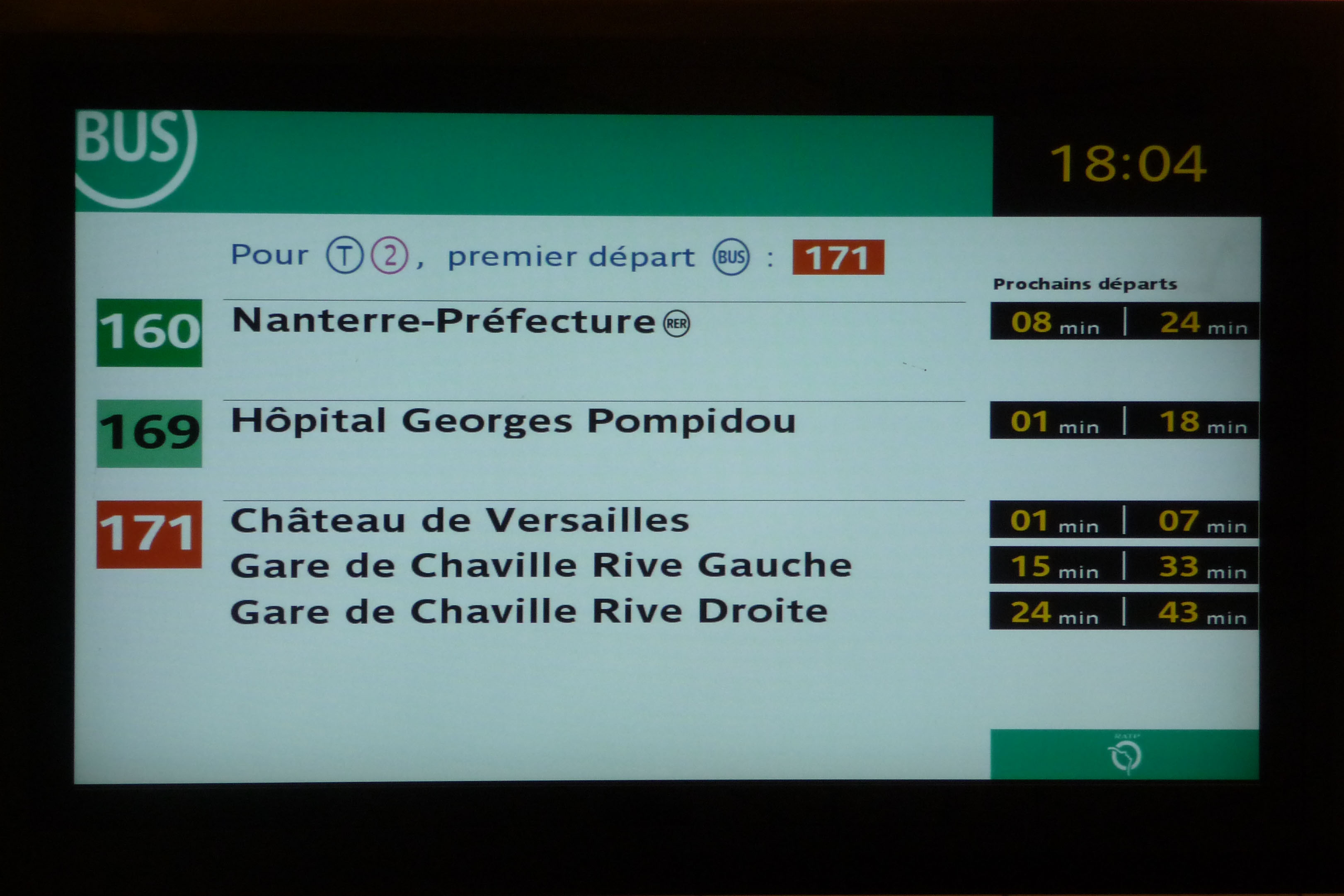 Ecran système IMAGE de la RATP à la Station Pont de Sèvres, Paris, France